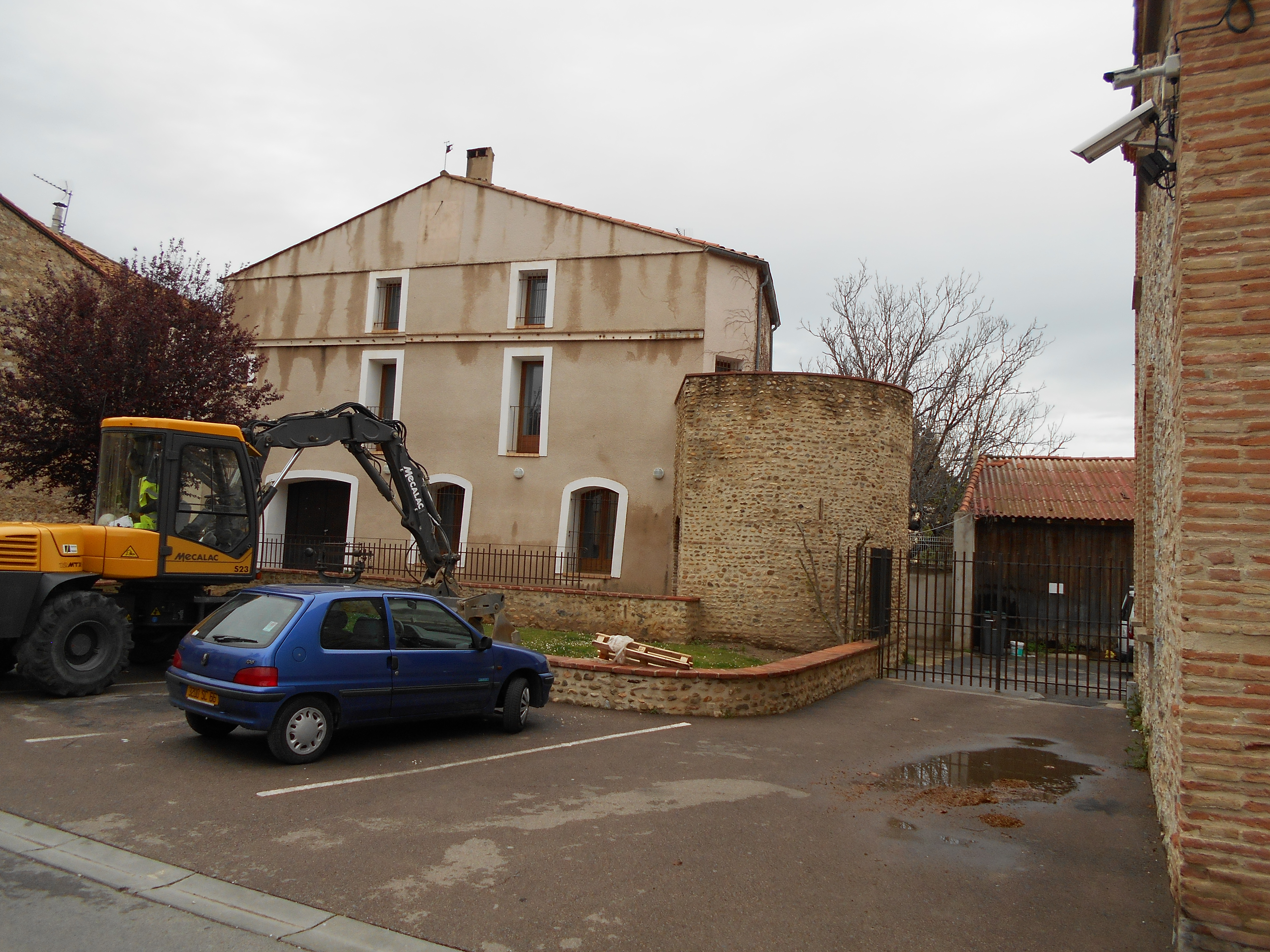 Torre del clos de la vila